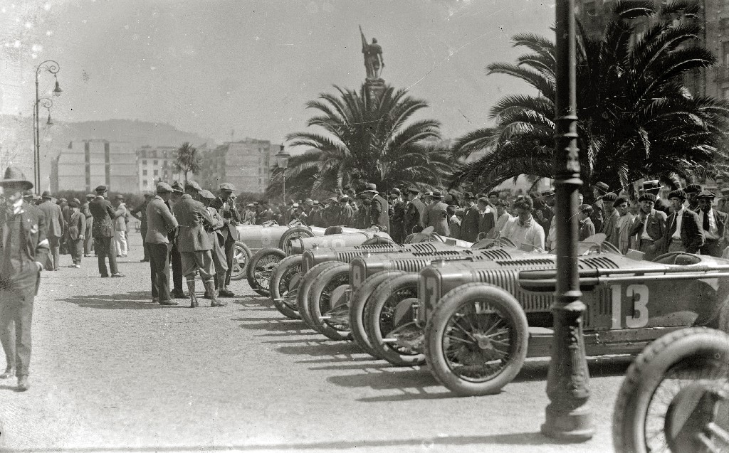 Título original: III Gran Premio Automóvilistico de San Sebastián (4/4) Localización: San Sebastián (Guipúzcoa)